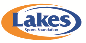 滋賀レイクスターズロゴ